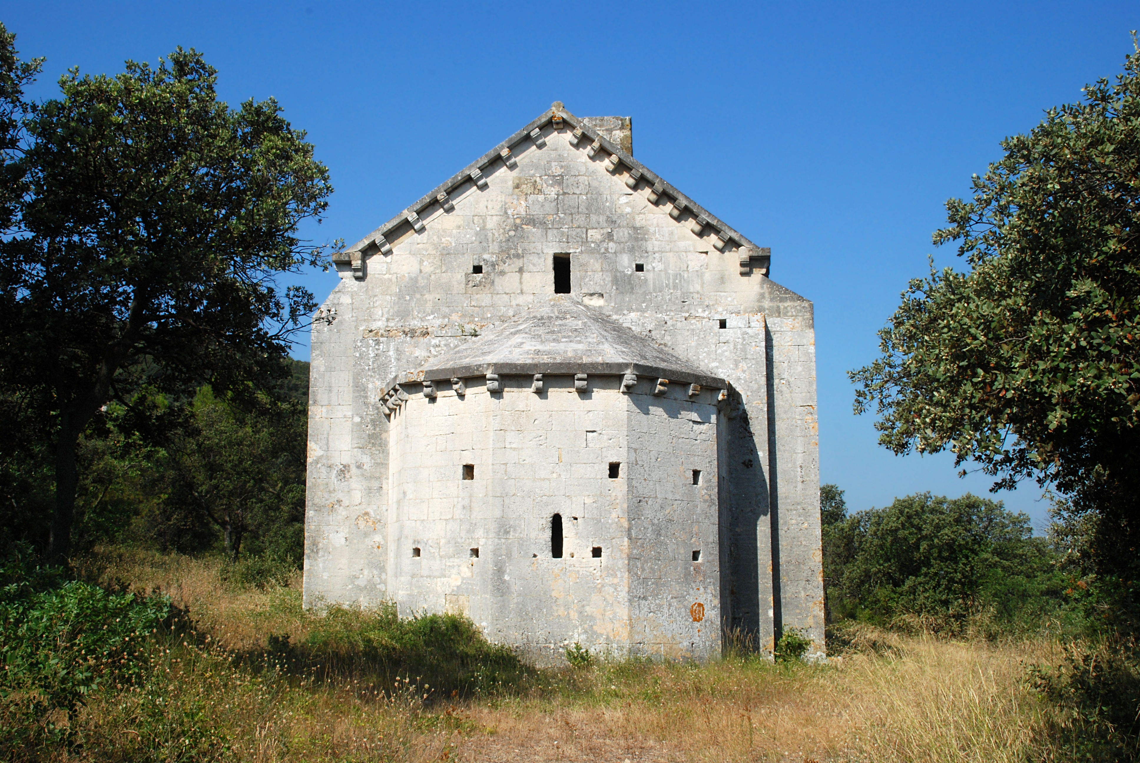 France - Provence - Boulbon - Saint-Julien